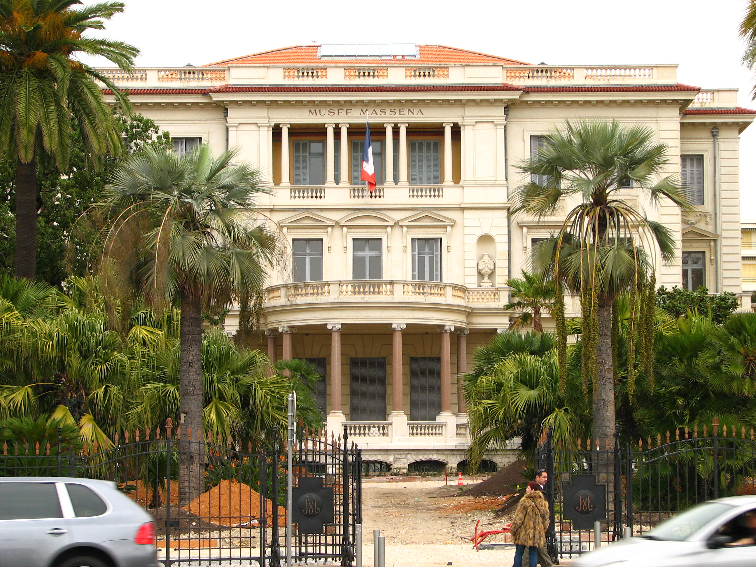 Nicea, Museum Massena